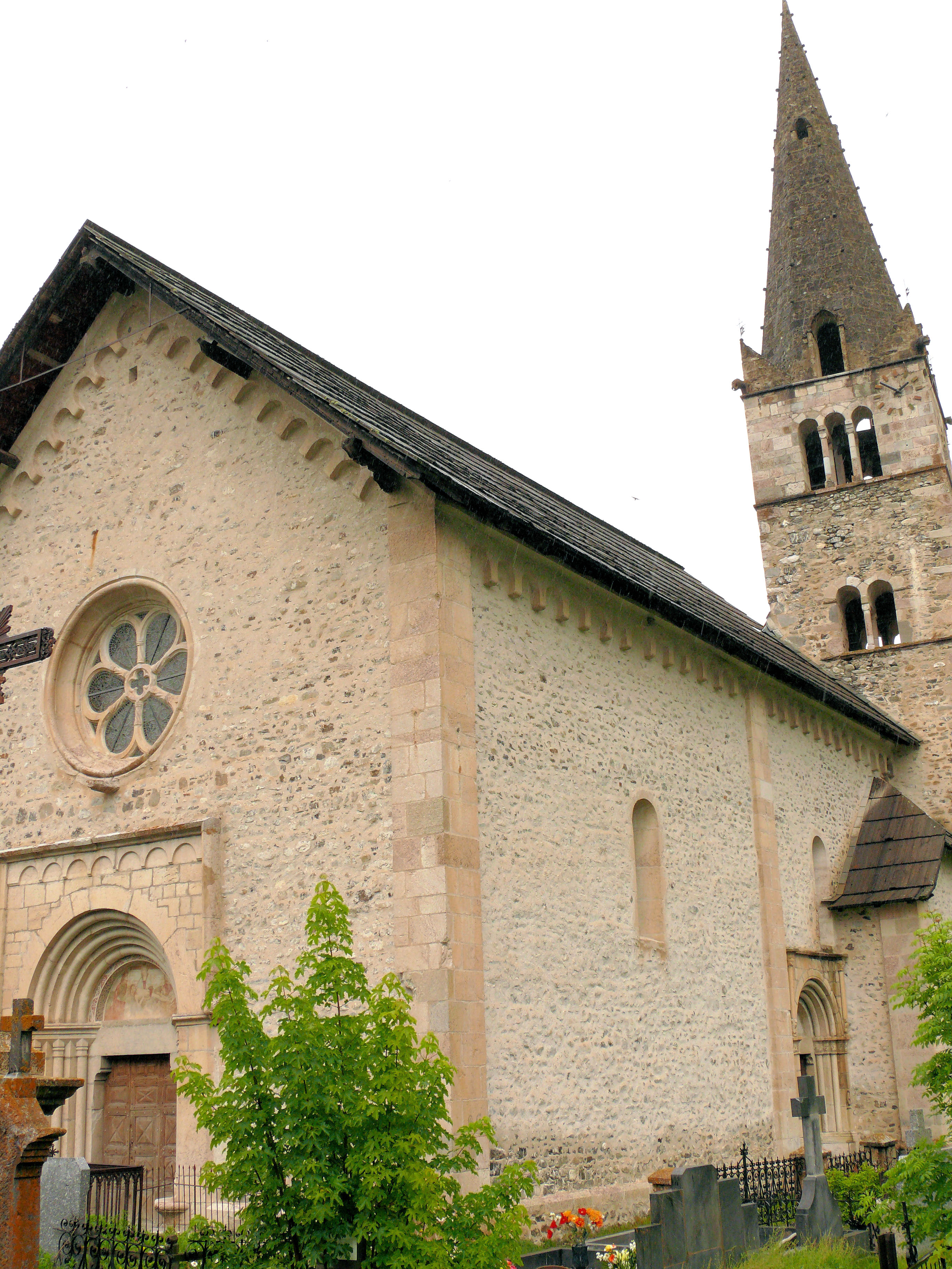 Saint-Paul-sur-Ubaye - Eglise Saint-Pierre-et-Saint-Paul - Vue d'ensemble côtés sud et ouest